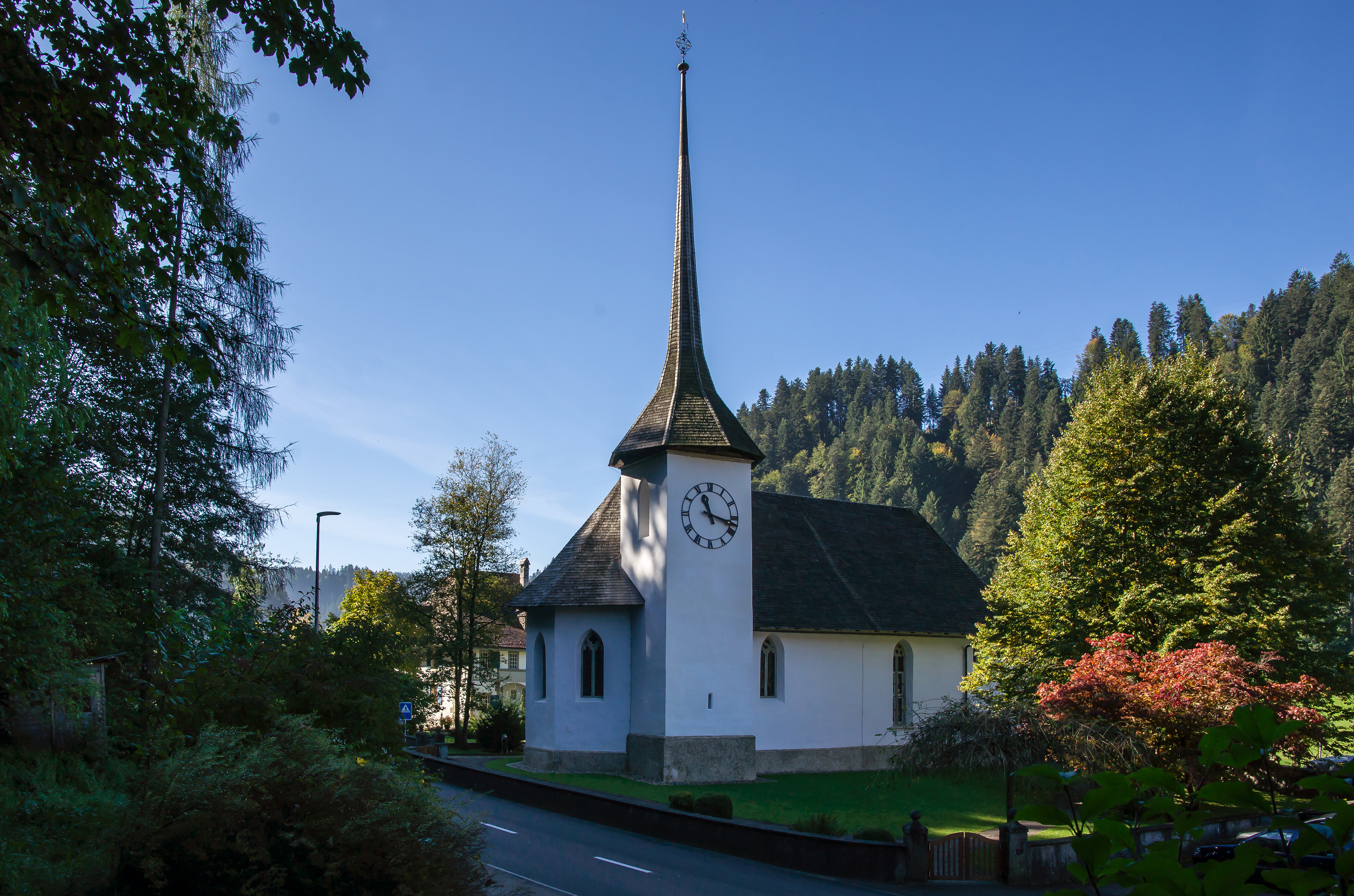 Reformierte Kirche mit Pfarrhaus